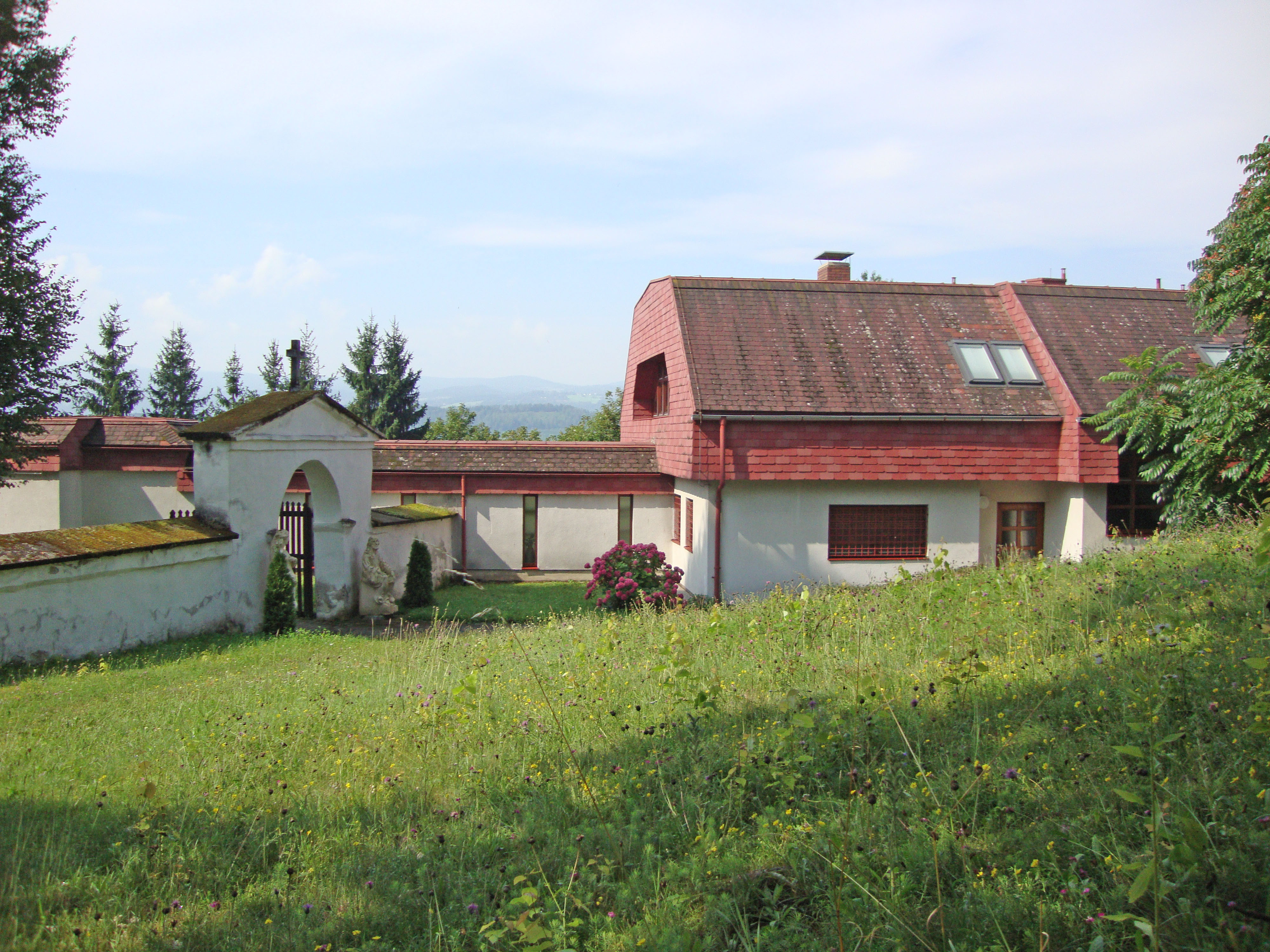 Heiliger Berg Karmel mit Kirche, Kloster, Kreuzweg und Hl.-Grab-Kapelle